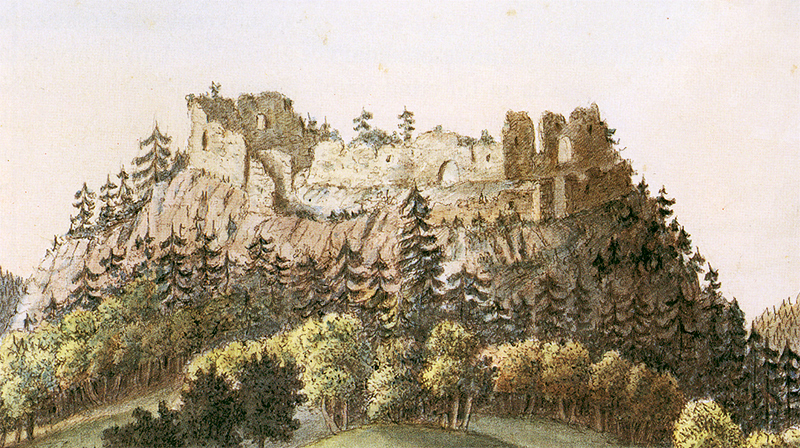 Fridrihštajn 19. stol.